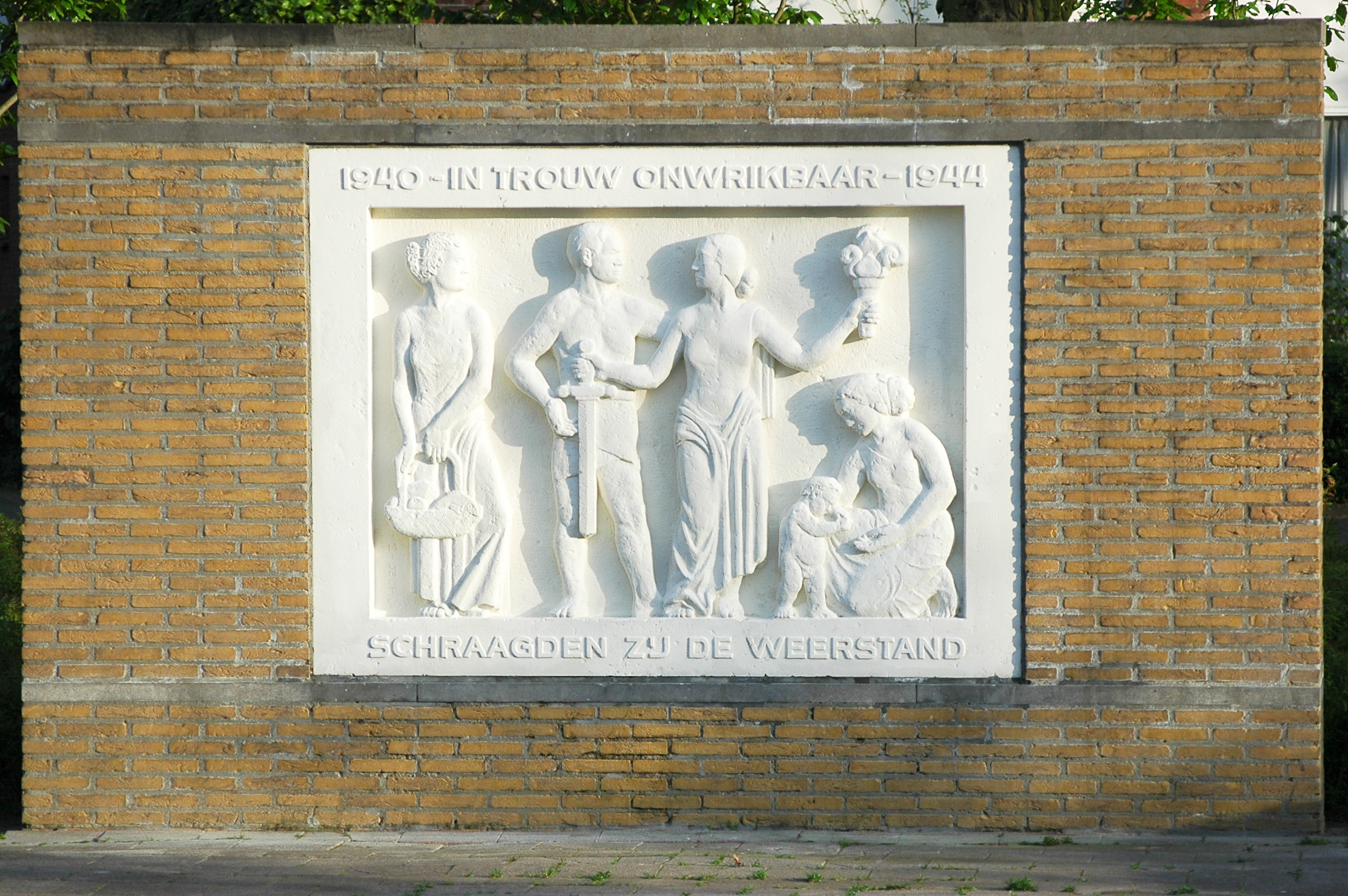 Monument voor de vrouw in oorlogstijd, Willy Mignot, plantsoen Parklaan, Eindhoven